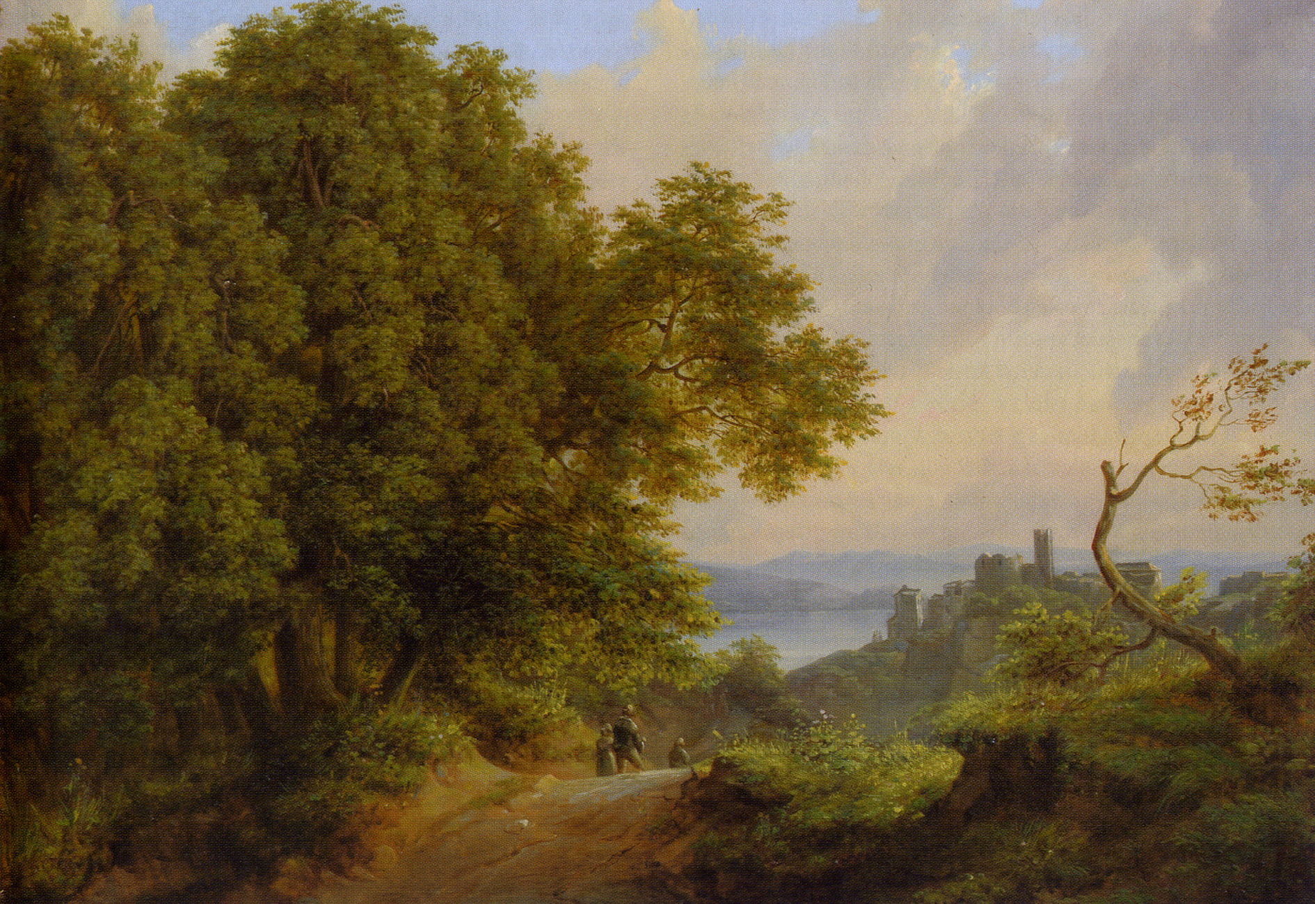 Август Матиас Хаген. Прогулка в Пассау. 1820 г